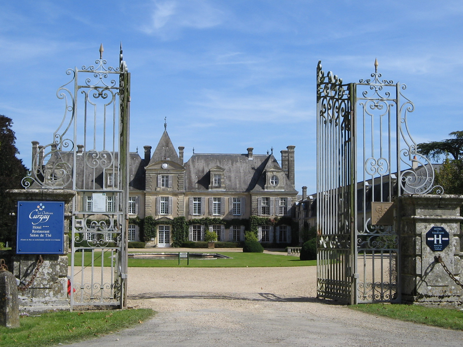 Le château de Curzay sur Vonne en 2008